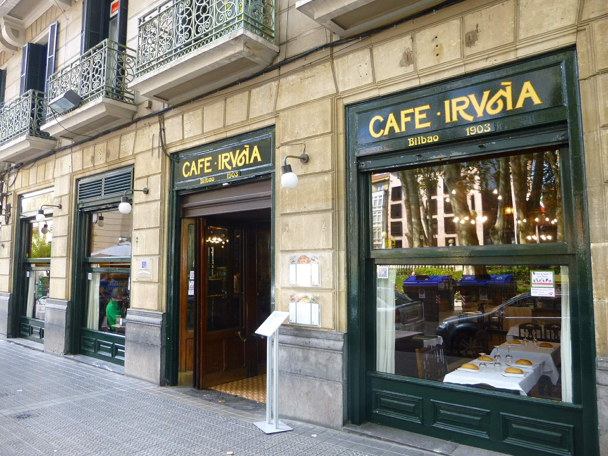 Bilbao - Café Iruña